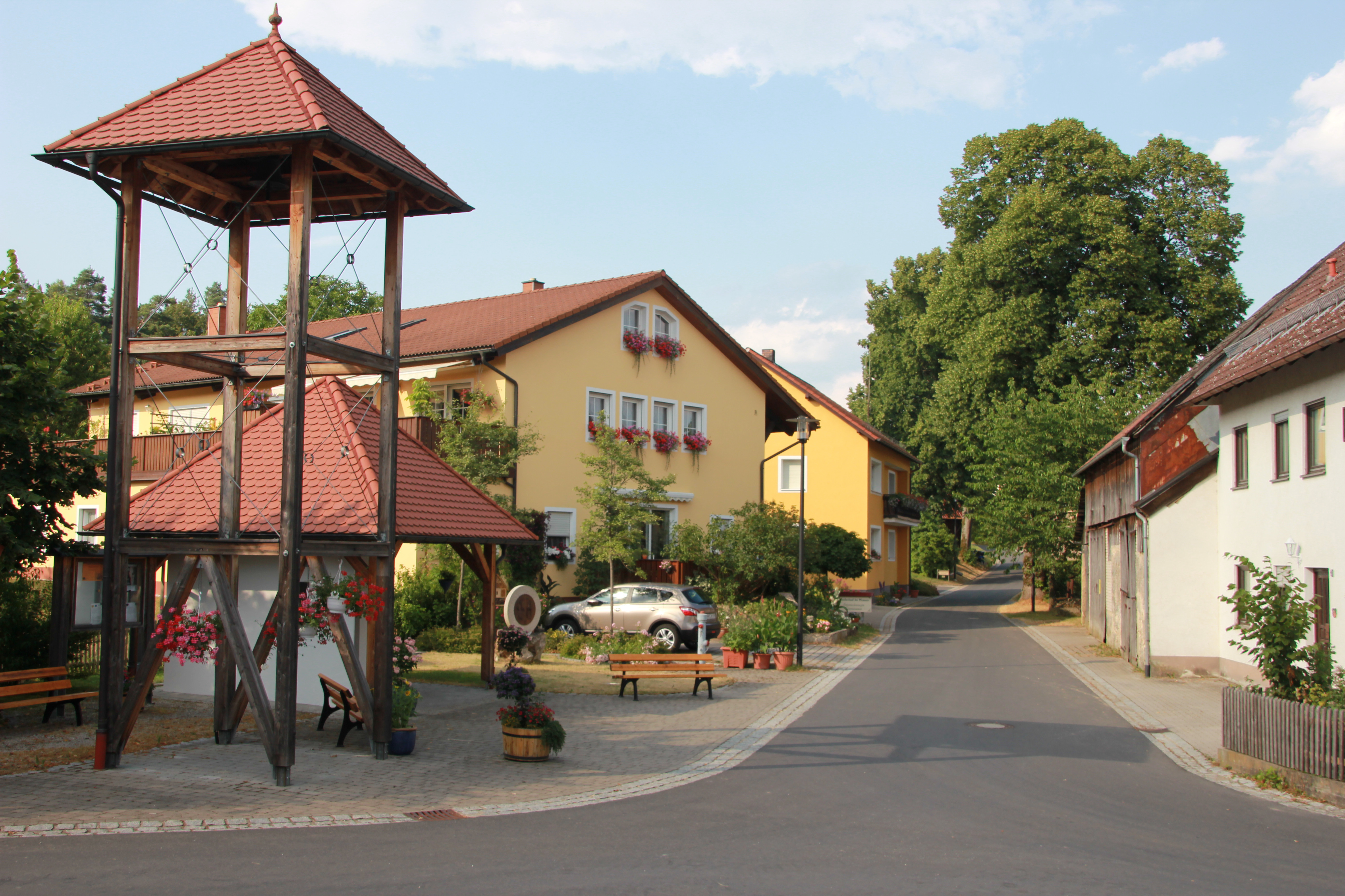 Bild des Glockenturms in Weidenloh